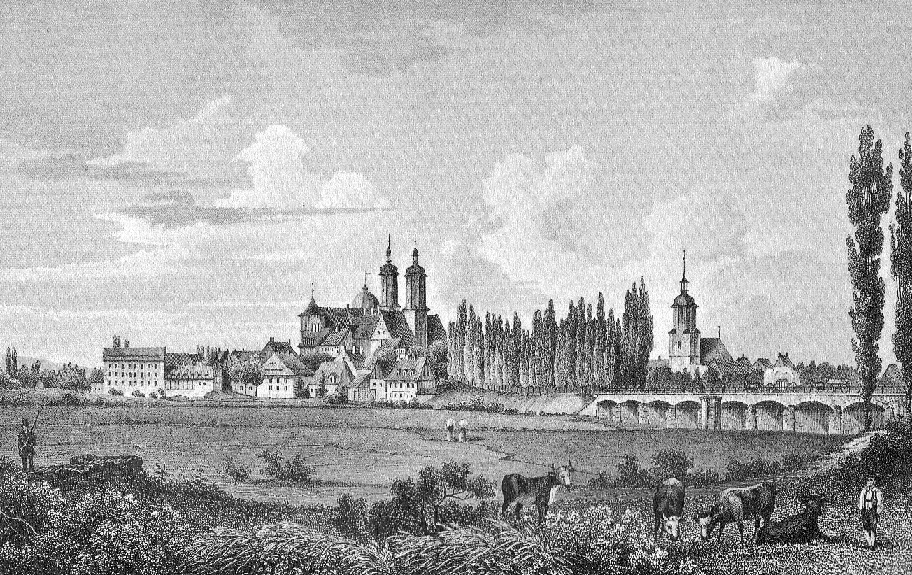 Historische Ansicht von Wurzen in Sachsen. Stahlstich.